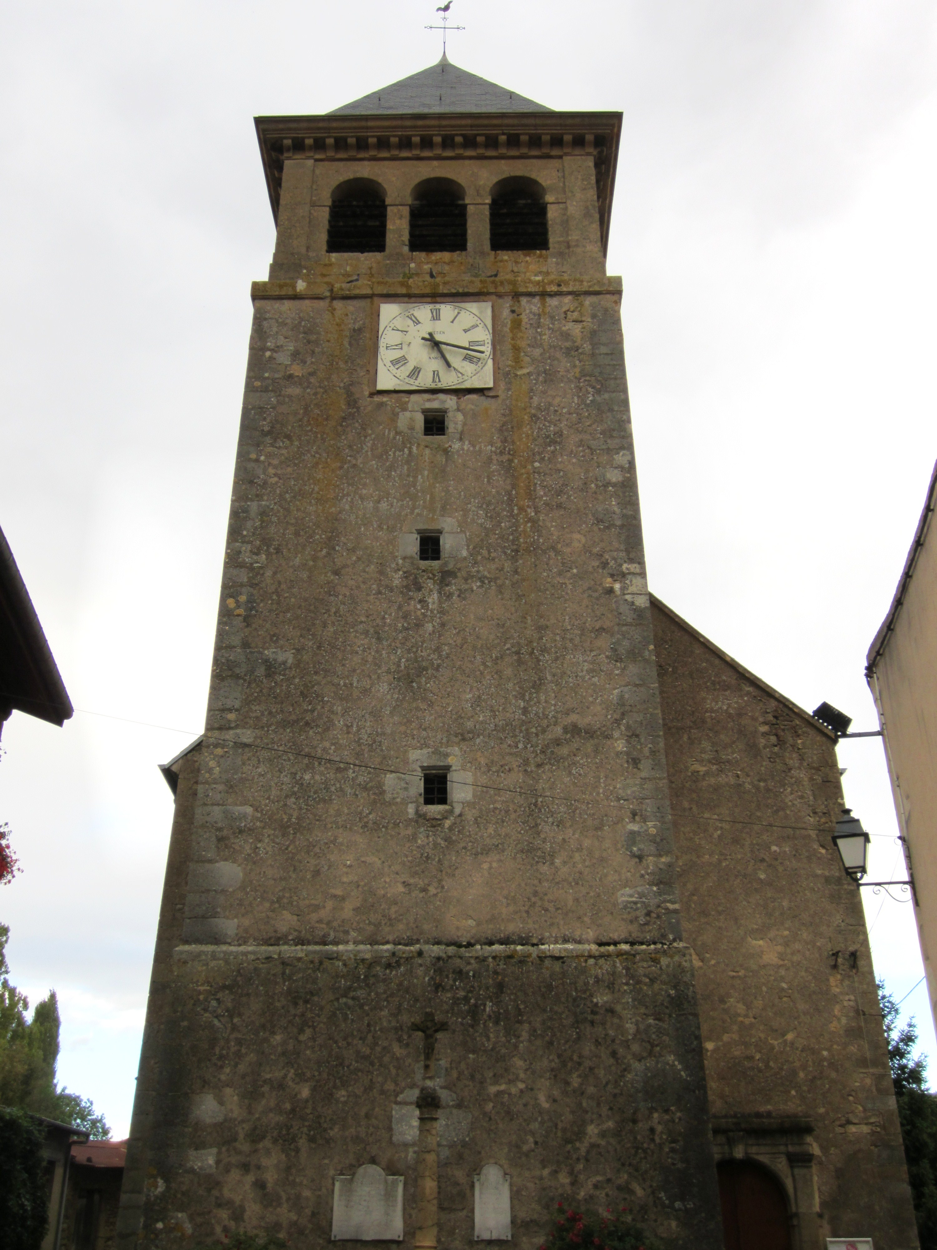 Description eglise Bayonville Mad eglise Bayonville Mad